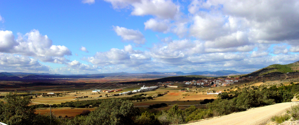 Graja de Campalbo, Cuenca, España. Vista Panorámica.